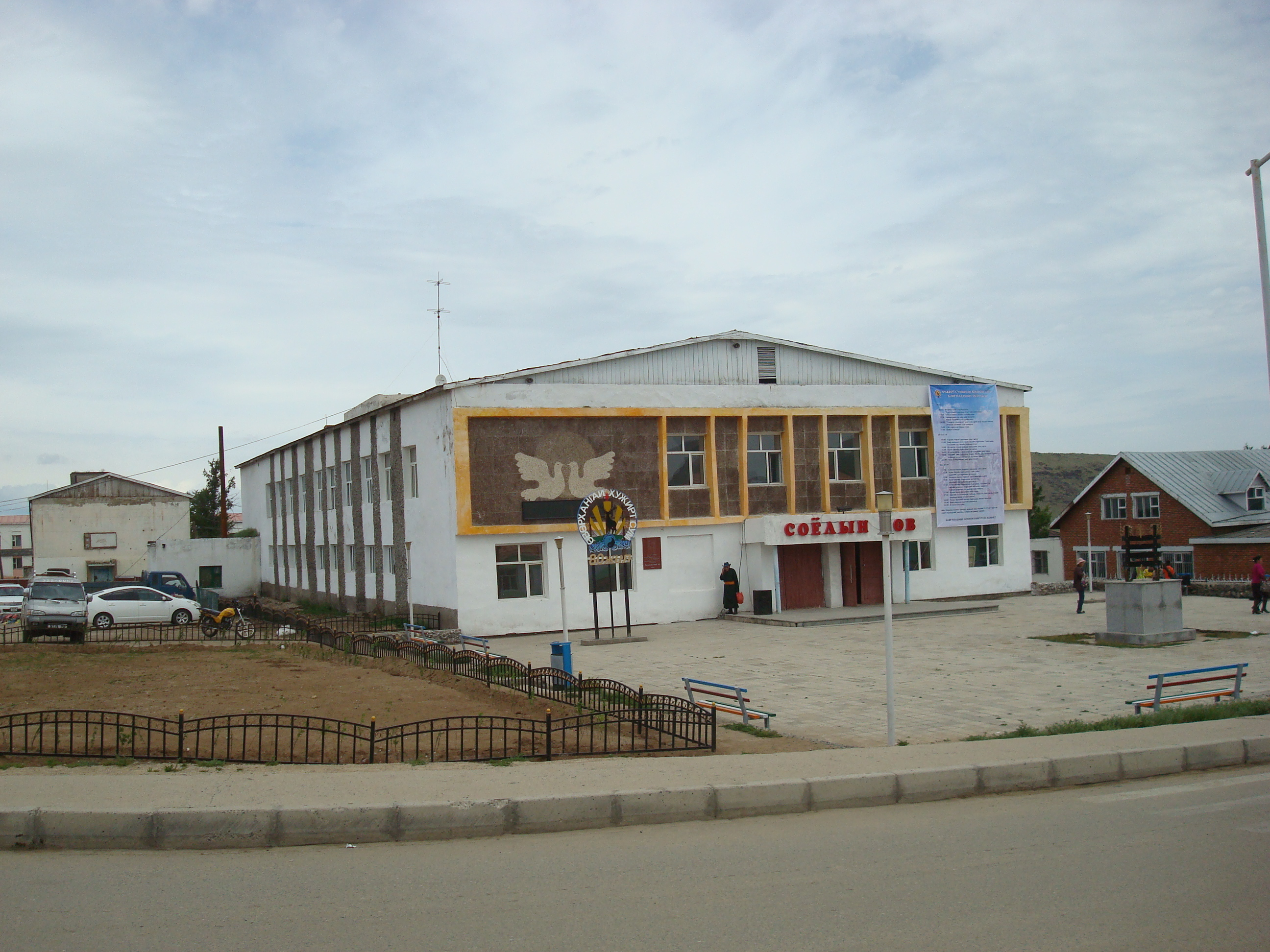 In Khujirt